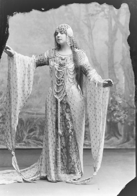 Retrat de cos sencer de la soprano Concepció "Conxita" Supervia i Pascual caracteritzada per a una actuació.